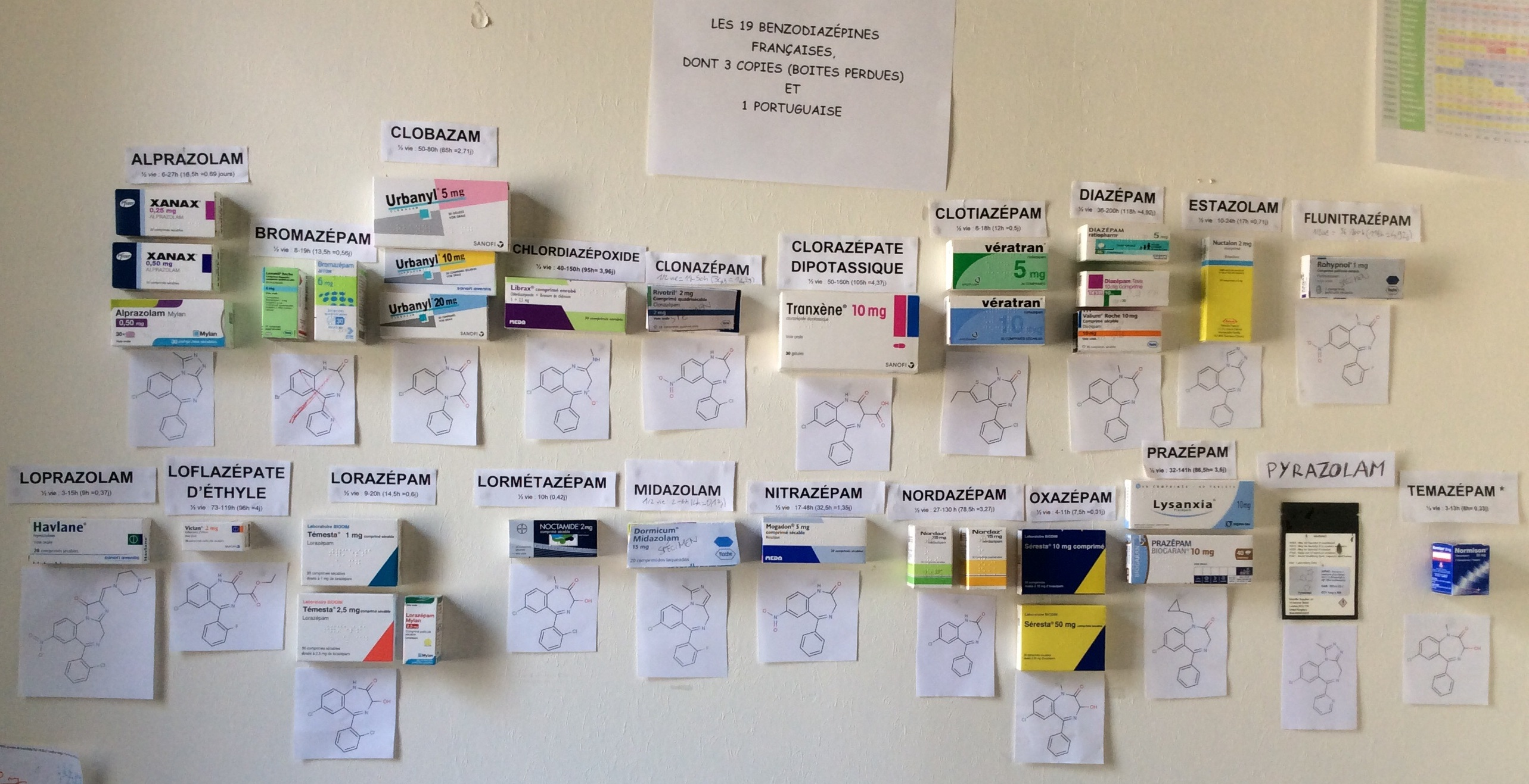 C'est une photo de toutes les boites de benzodiazépines que l'on peut obtenir en France.